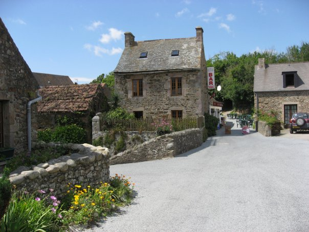 Le Bourg du village de Vauville